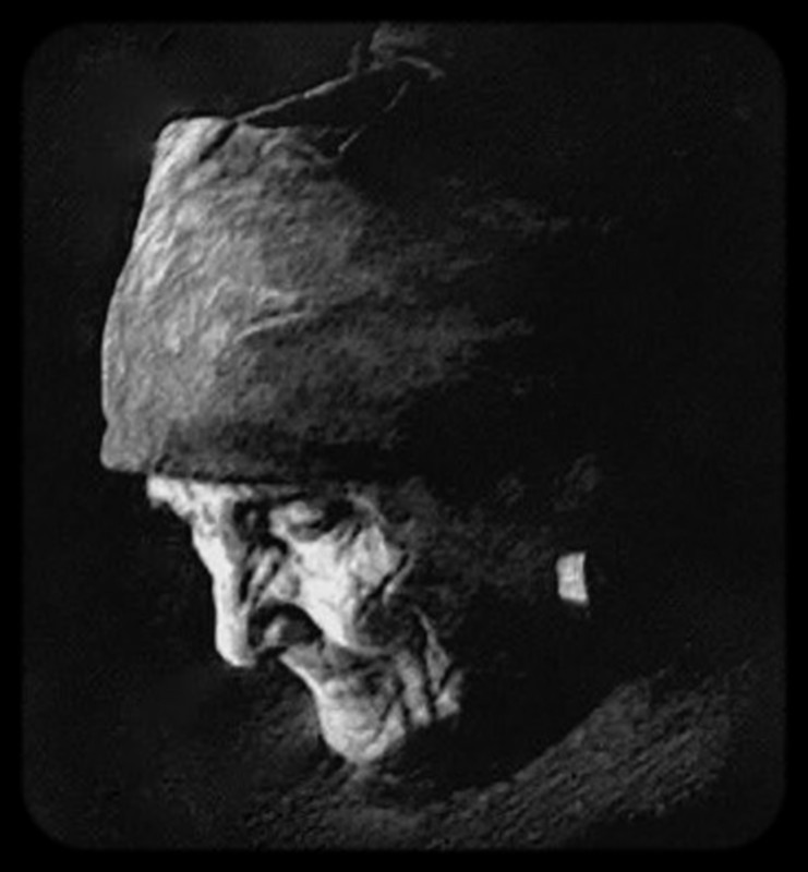 Rosa Ramalho, barrista portuguesa